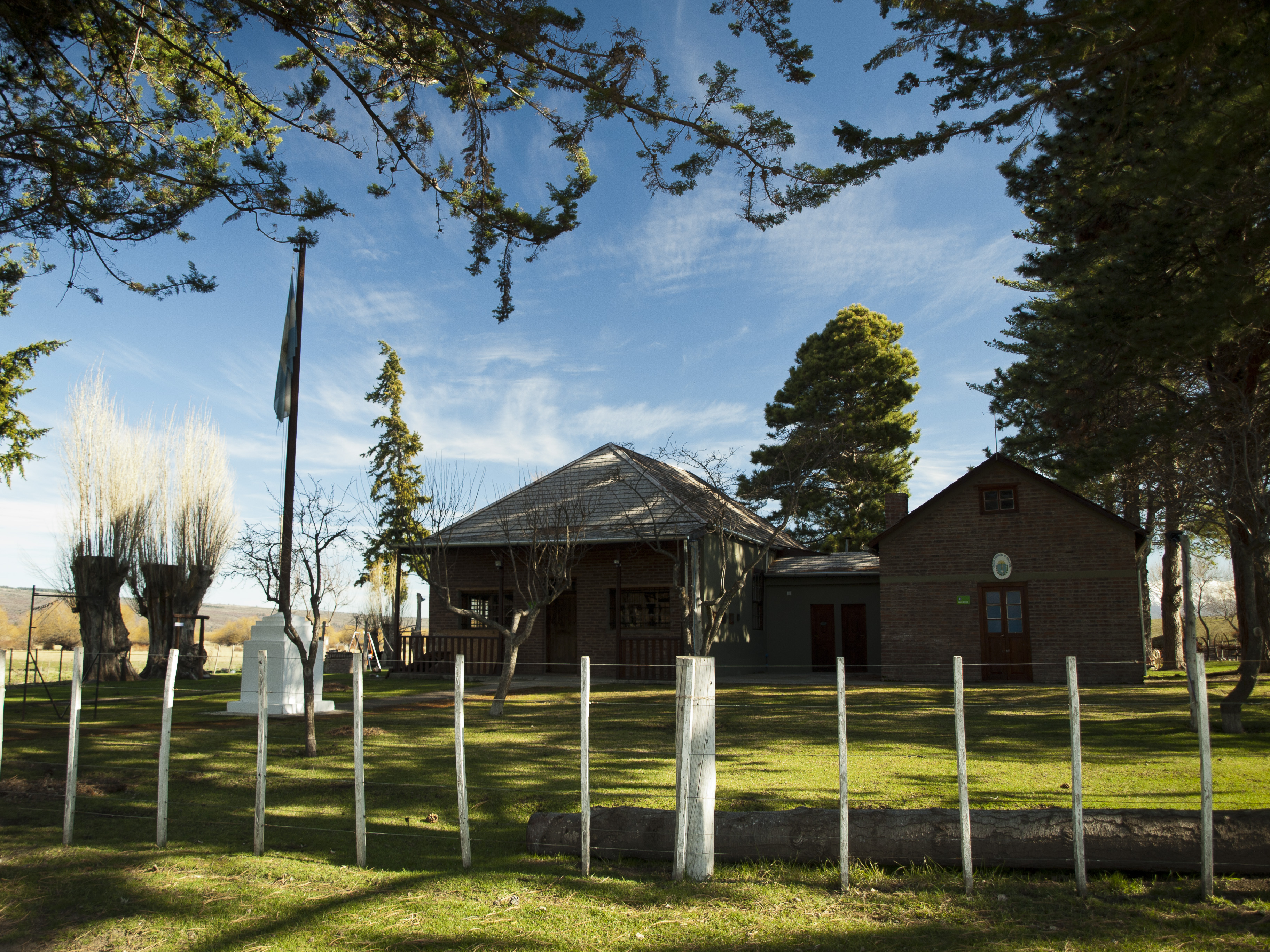 Vista del frente de la Escuela Nacional N°18. Dentro de un aula funciona museo que a la fecha de la foto estaba en reformas.